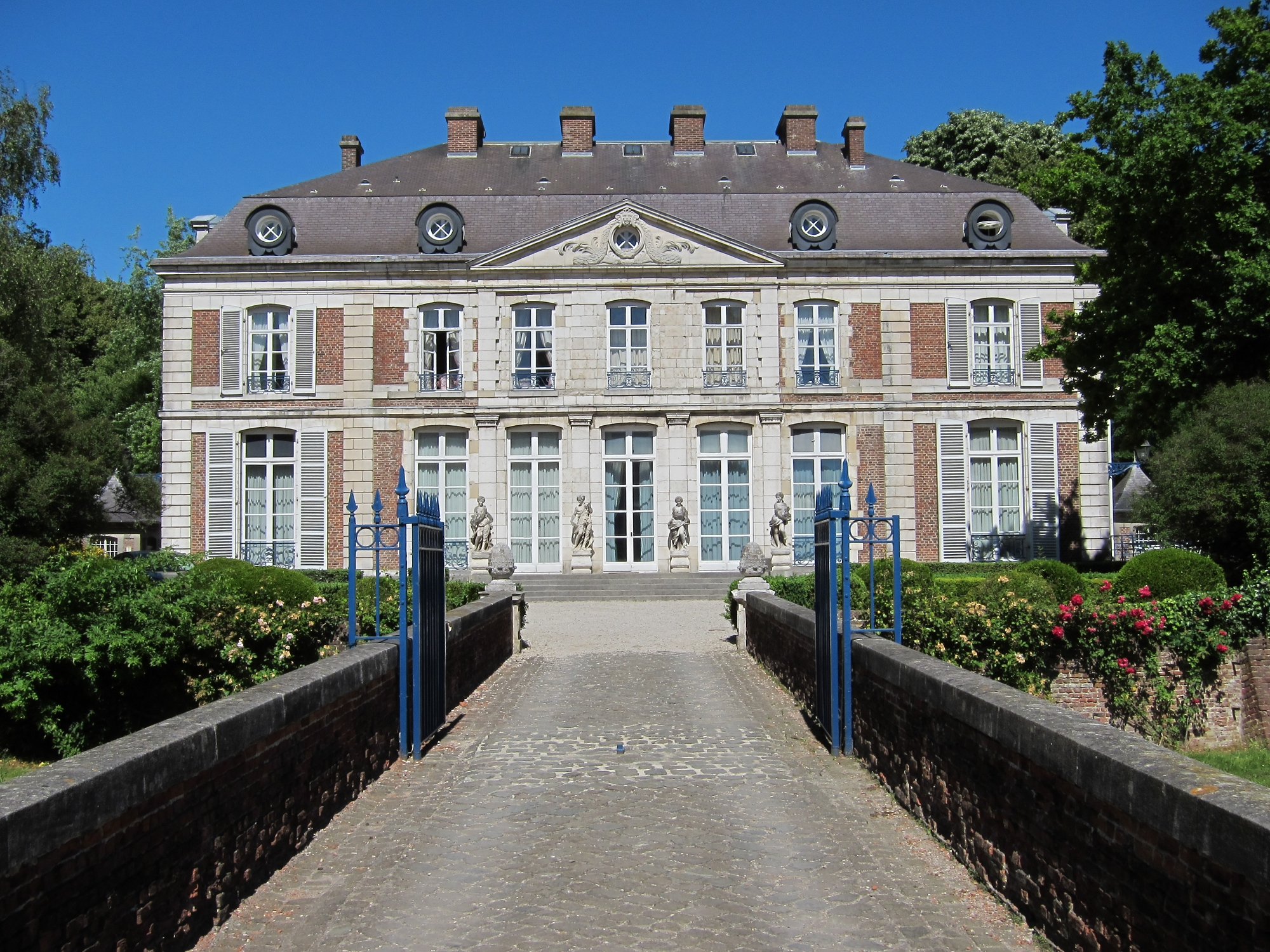 Le château du Vert Bois à Bondues (Nord).